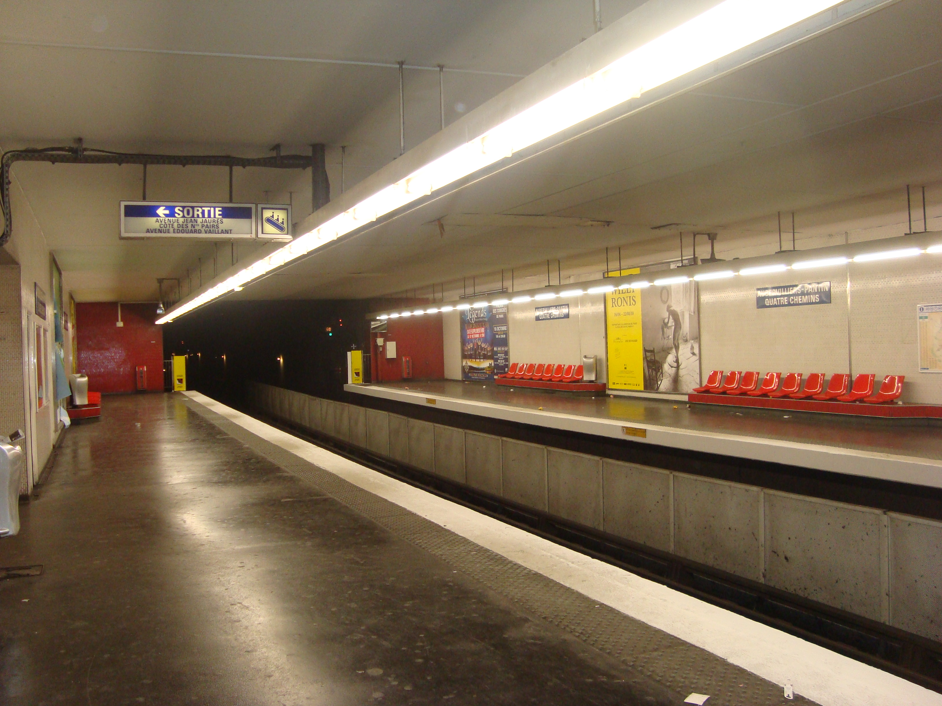 Quais de la station Quatre Chemins sur la ligne 7 du métro de Paris.